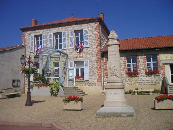 Lezigneux